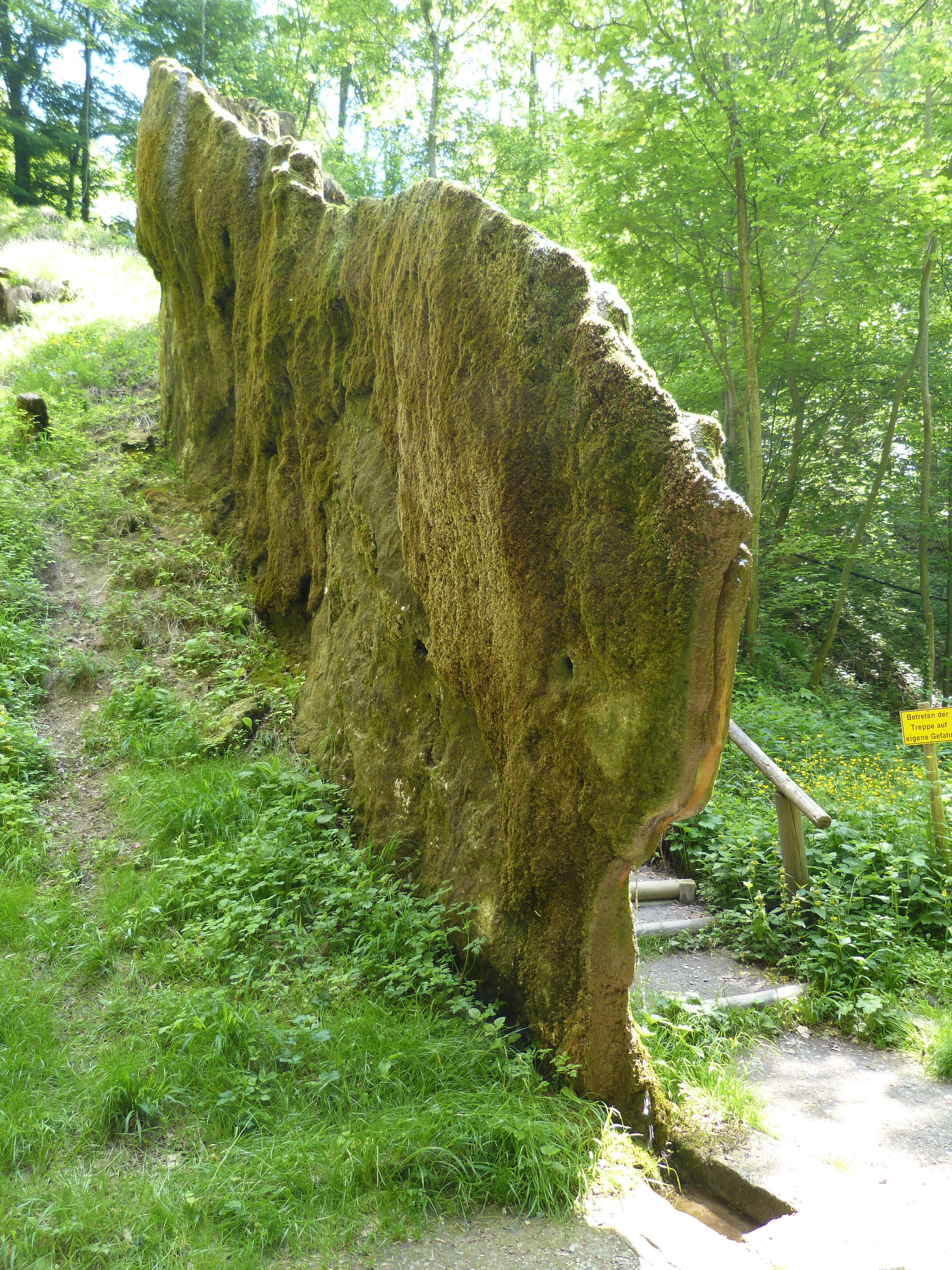 Wachsender Felsen von Usterling Geotop ( 279R004 ) Naturdenkmal